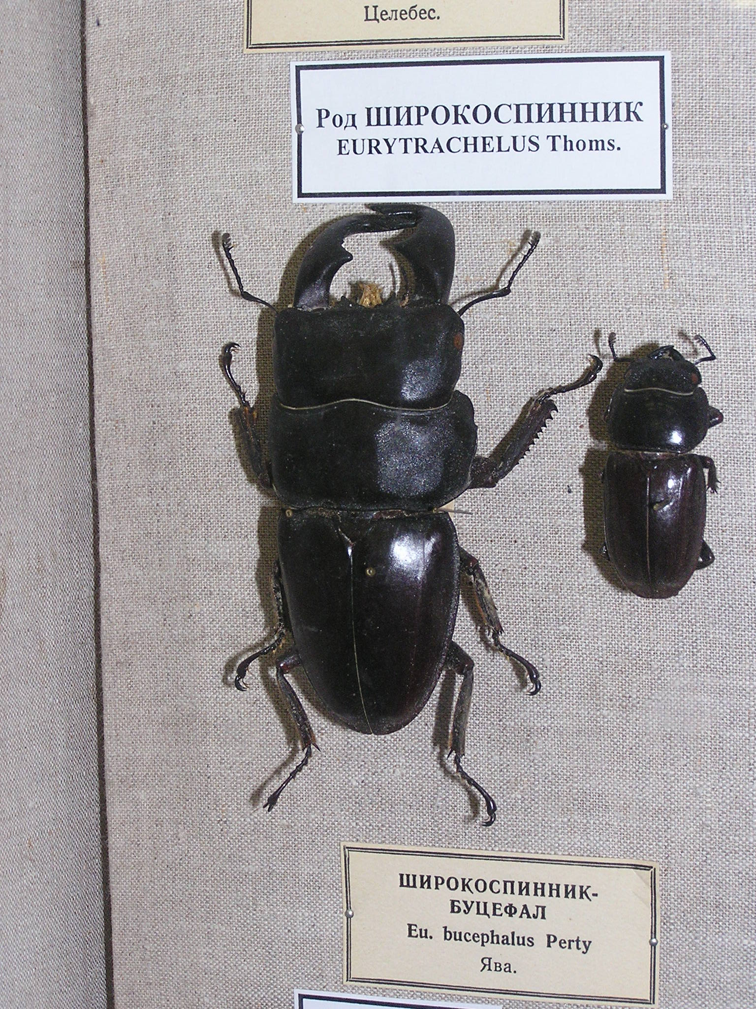 Зоологический музей в Санкт-Петербурге. Широкоспиник-буцефал This photograph taken in Zoological Museum of the Zoological Institute of the Russian Academy of Sciences Note: It is only museum co-ordinates, instead of an area of live animals.